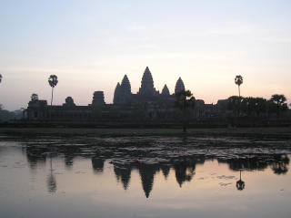 アンコールワット category:世界遺産画像 撮影者:Yosemite